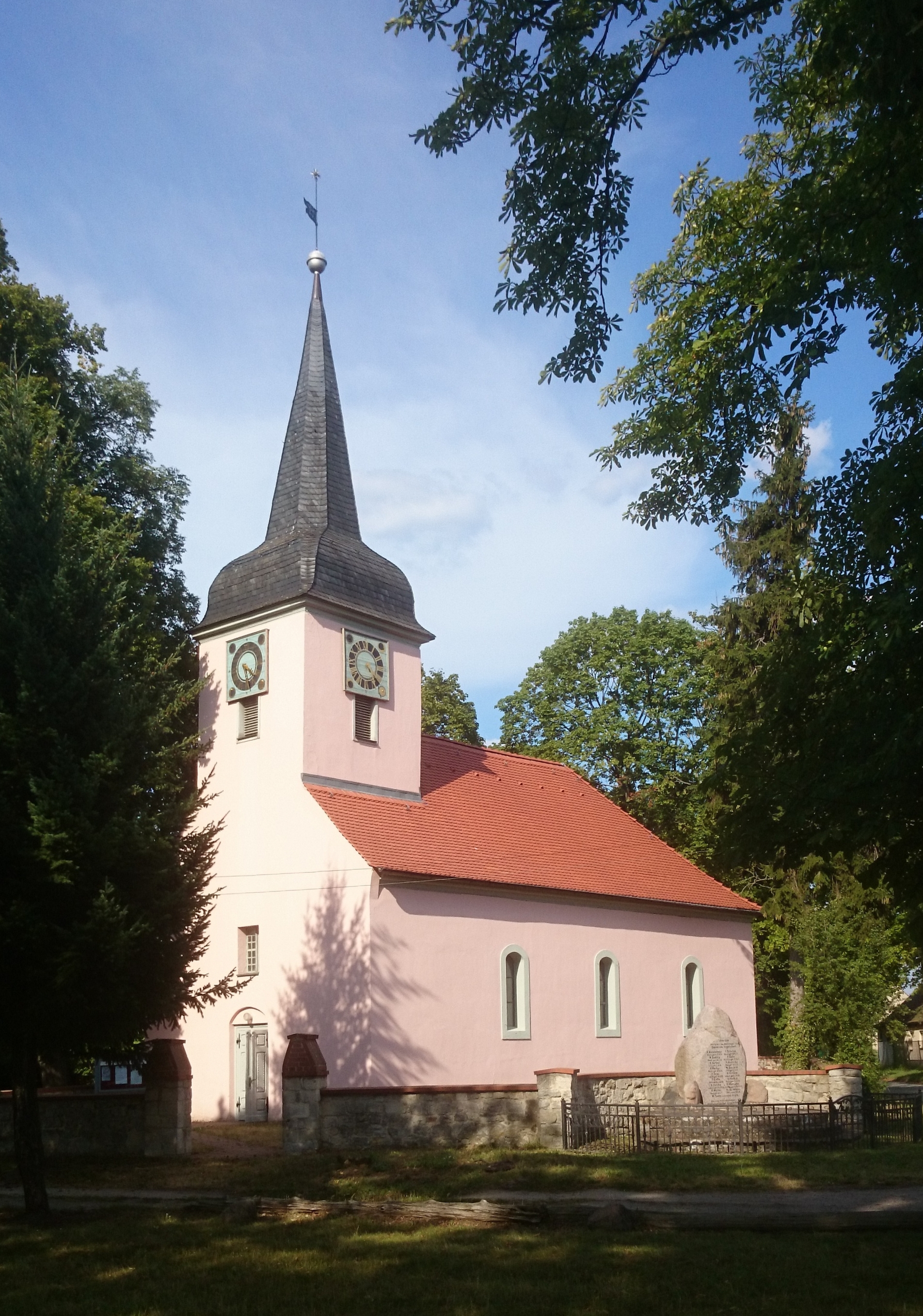 Evangelische Dorfkirche Vogelsdorf, 1714 erbaut und in den Jahre 1937 bis 1939 umgebaut. Der Kanzelaltar im Inneren stammt aus dem Jahre 1714.